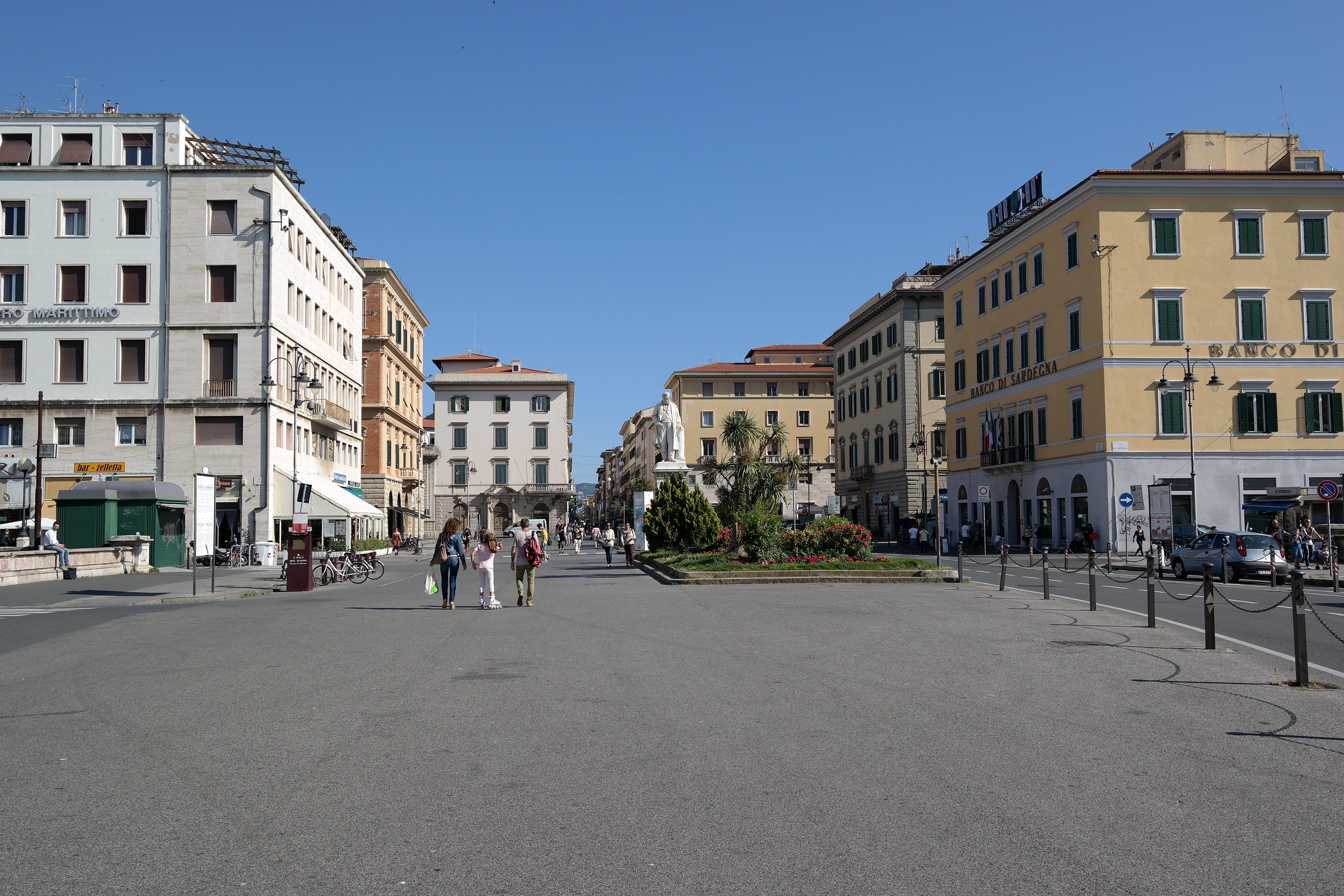 Piazza Cavour a Livorno